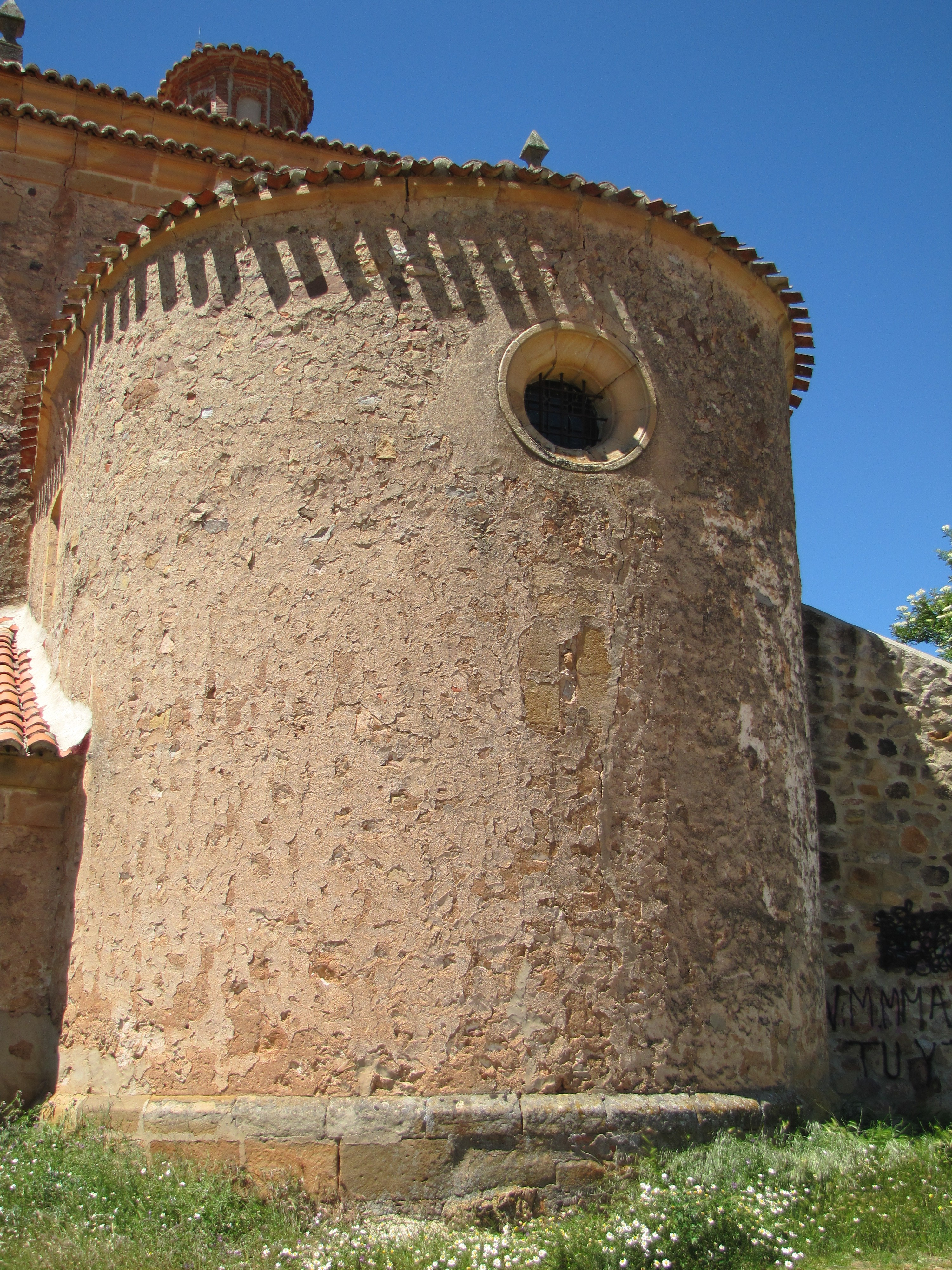 Ábside románico de Nuestra Señora del Mirón en Soria.